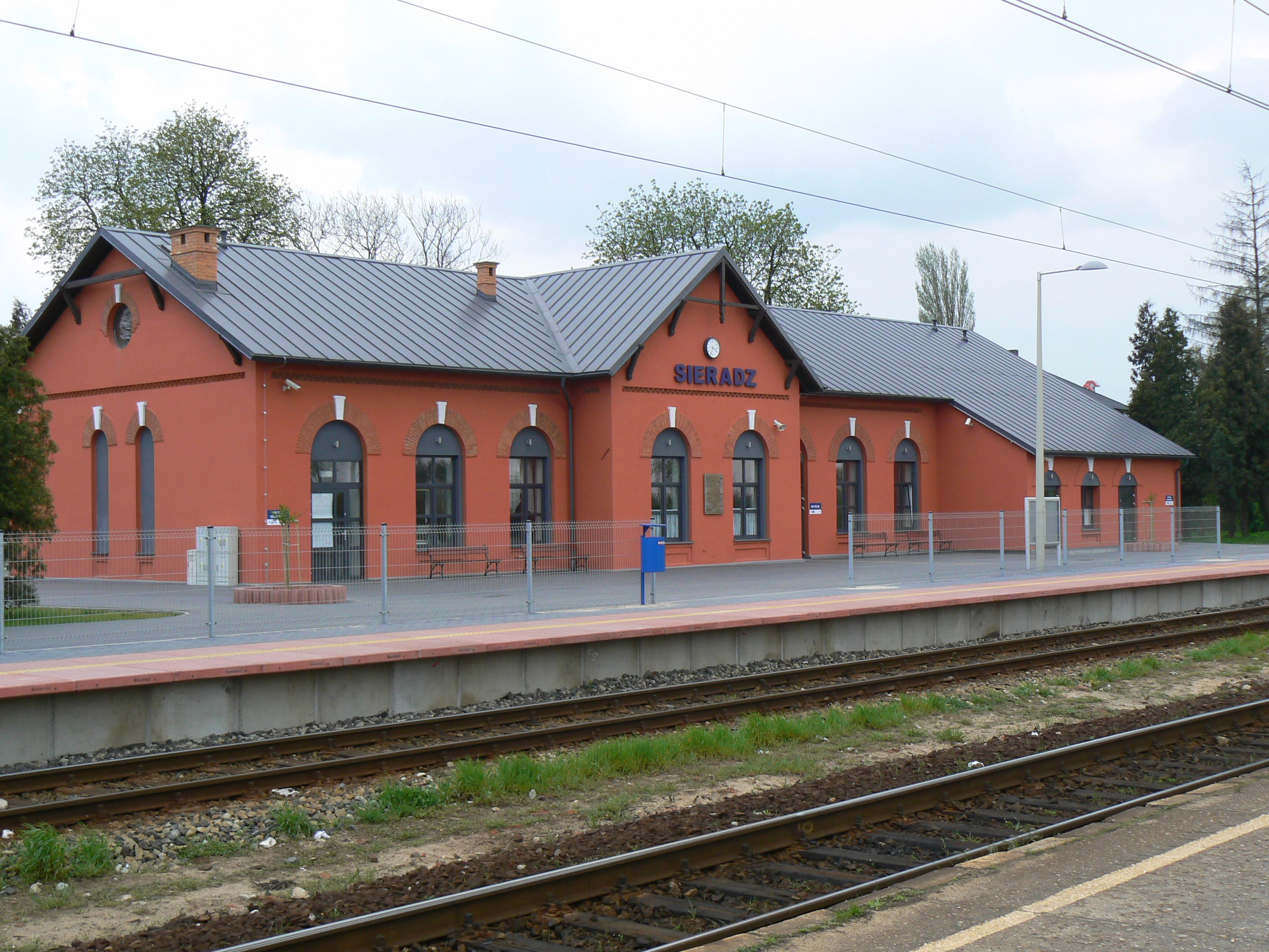 Wyremontowany dworzec na stacji Sieradz.